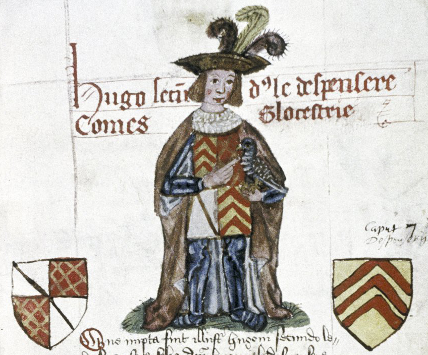 Хью Диспенсер Младший. Миниатюра из Книги основателей и благотворителей аббатства Тьюксбери. 16 век. Бодлеанская библиотека